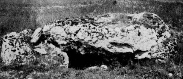 Le site du dolmen de Villaine, à Sublaines (détail).